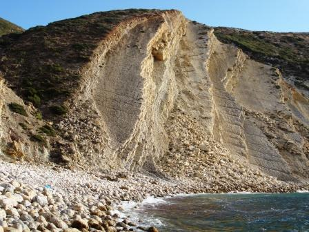 Baía dos Lagosteiros, no Cabo Espichel